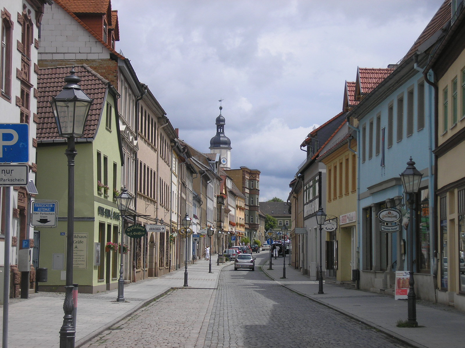 Die Altstadt von Eisenberg (Thüringen).